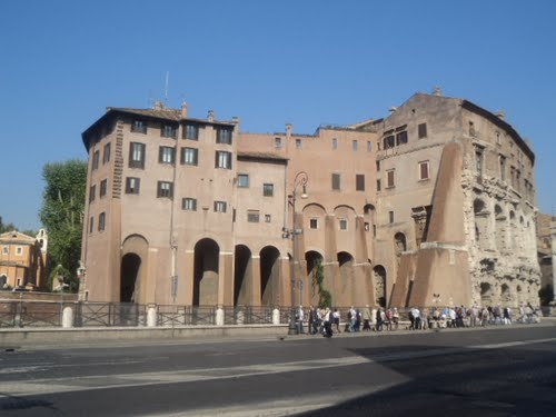 Roma, Teatro di Marcello e palazzo Savelli-Orsini